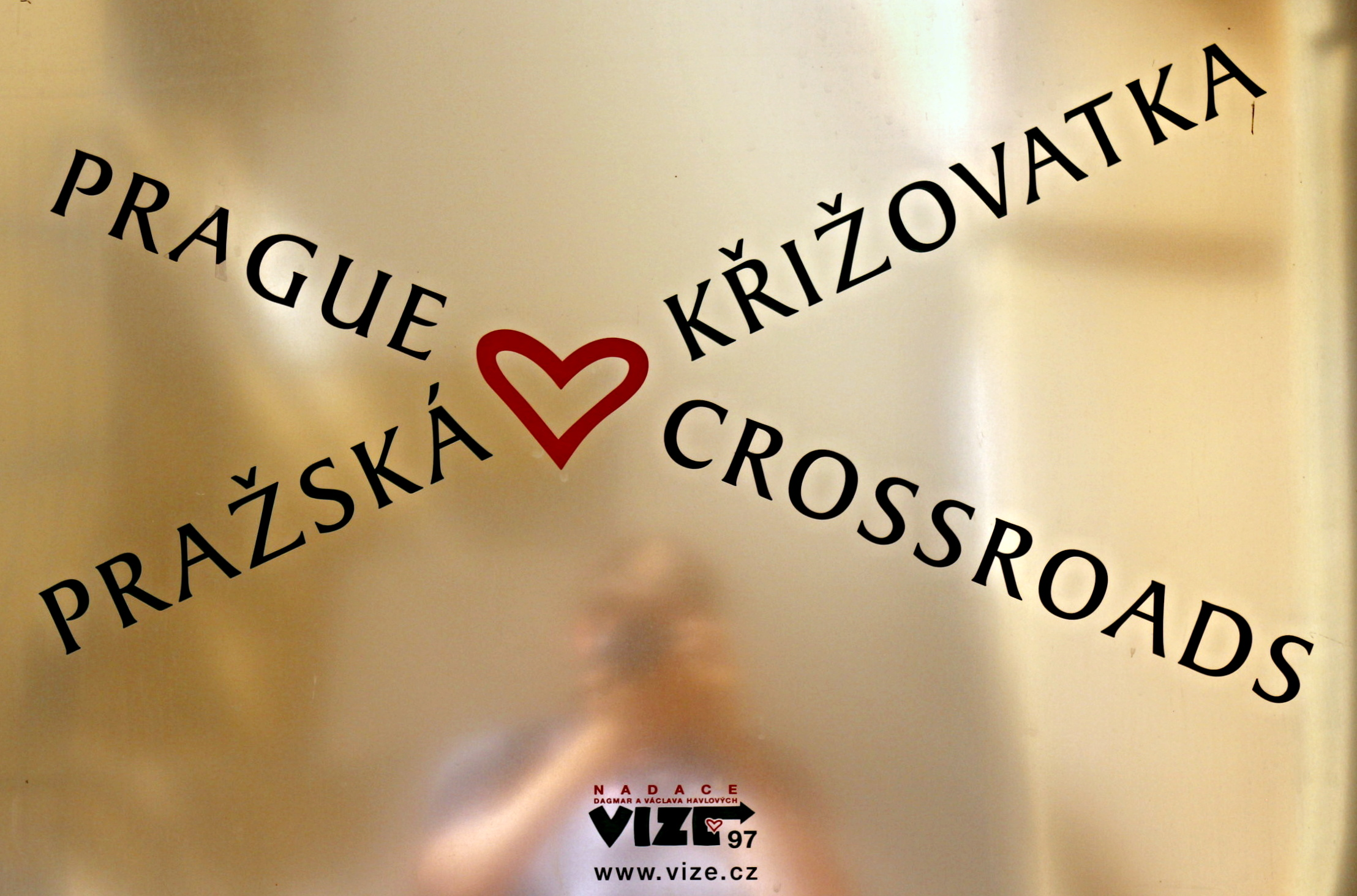 Kostel svaté Anny na Starém Městě